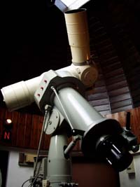 Das Coudé-Teleskop (Refraktor) der Sternwarte Heilbronn (Carl Zeiss Jena, 1983)